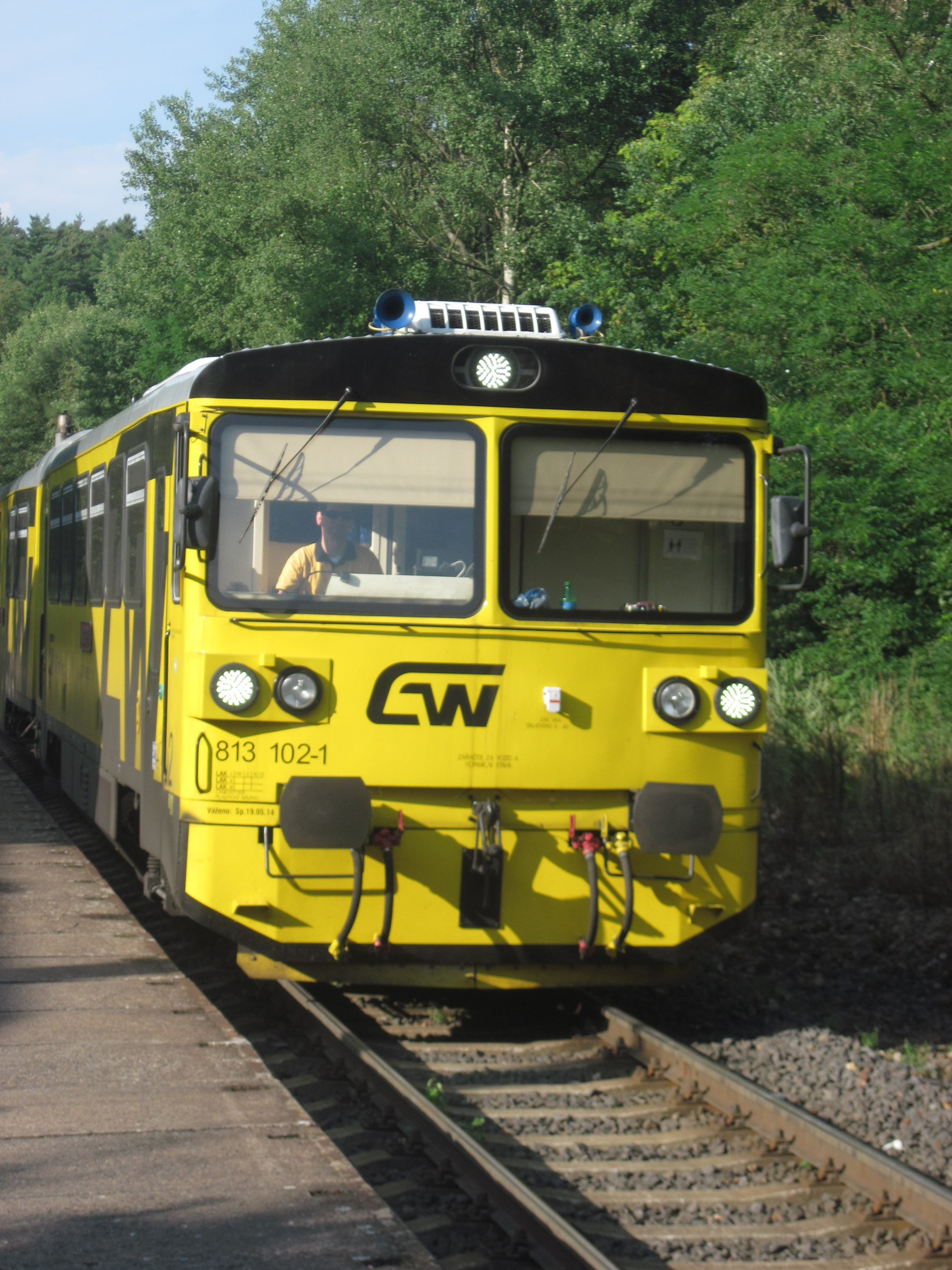 Motorová jednotka 813 ve stanici Doubí u Karlových Varů